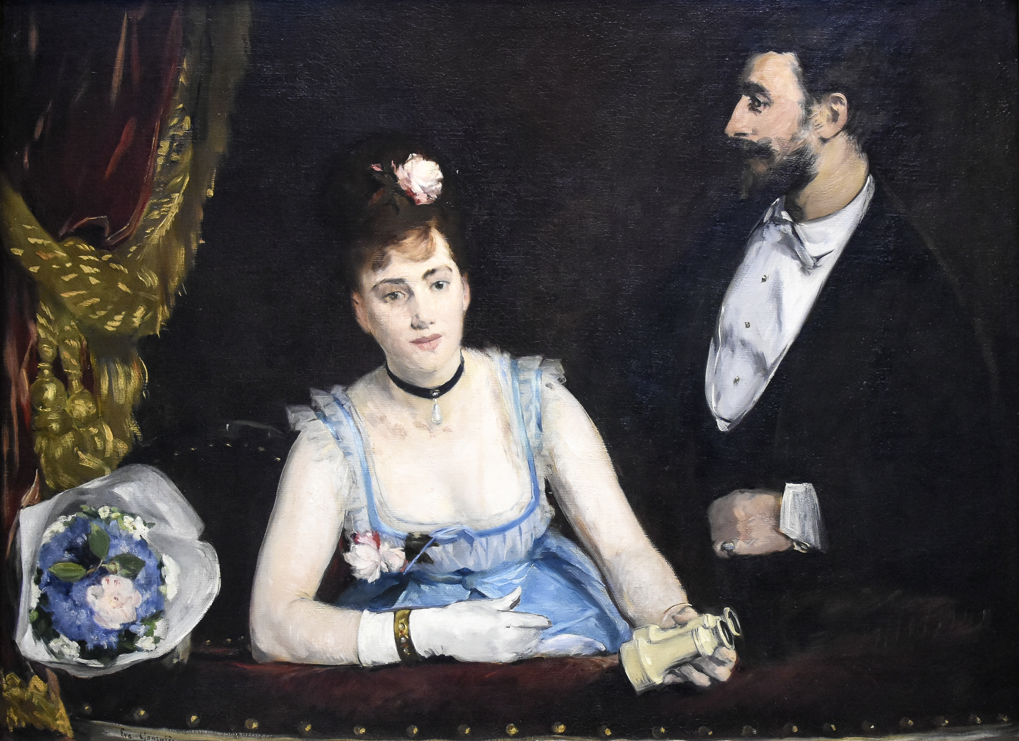 Eva Gonzalès (1849-1883) Een loge in het Théâtre des Italiens (1874) Musée d'Orsay